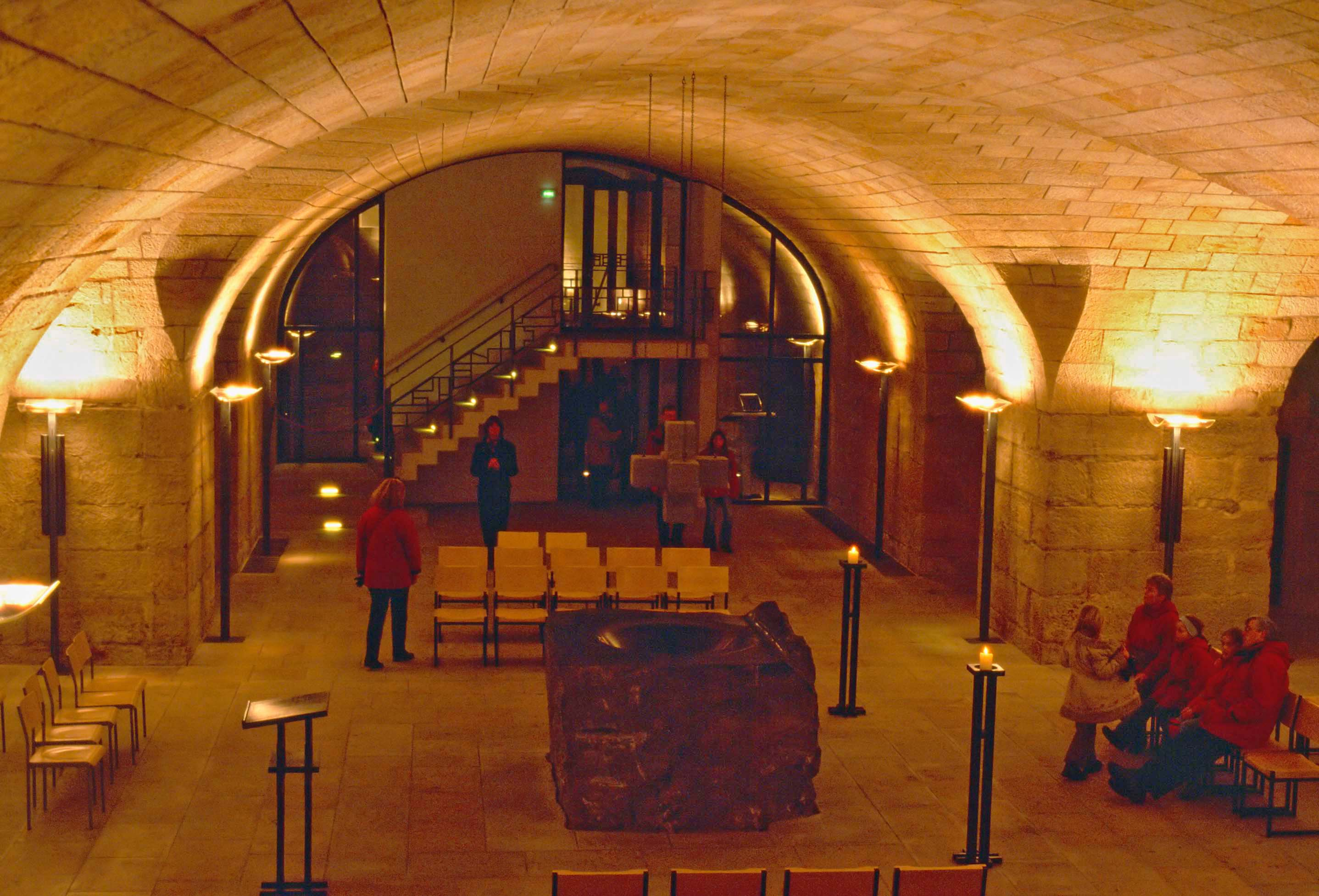 Unterkirche der Dresdner Frauenkirche